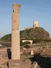 Fotografia dell'unica colonna rimasta integra del Tempio di Era Lacinia a Pula (provincia di Cagliari).